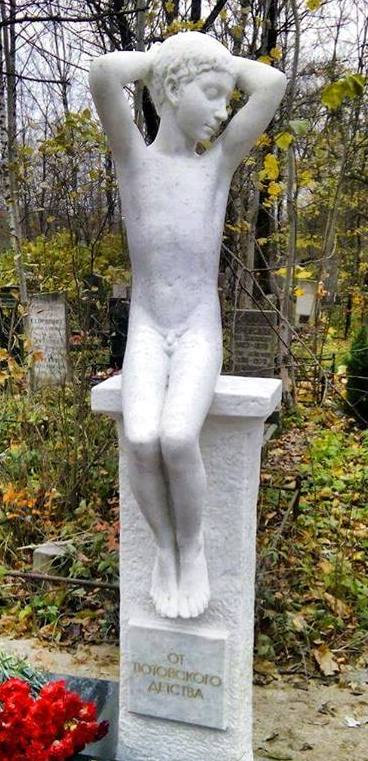 Могила Матвея Дубровина (надпись: от тютовского детства)